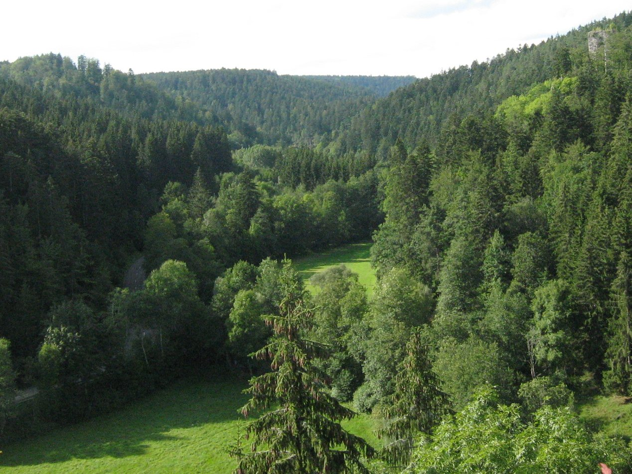 Blick von der Burgruine Roggenbach flussaufwärts ins obere Steinatal. Rechts oben im Bild ist die Burgruine Steinegg zu sehen.